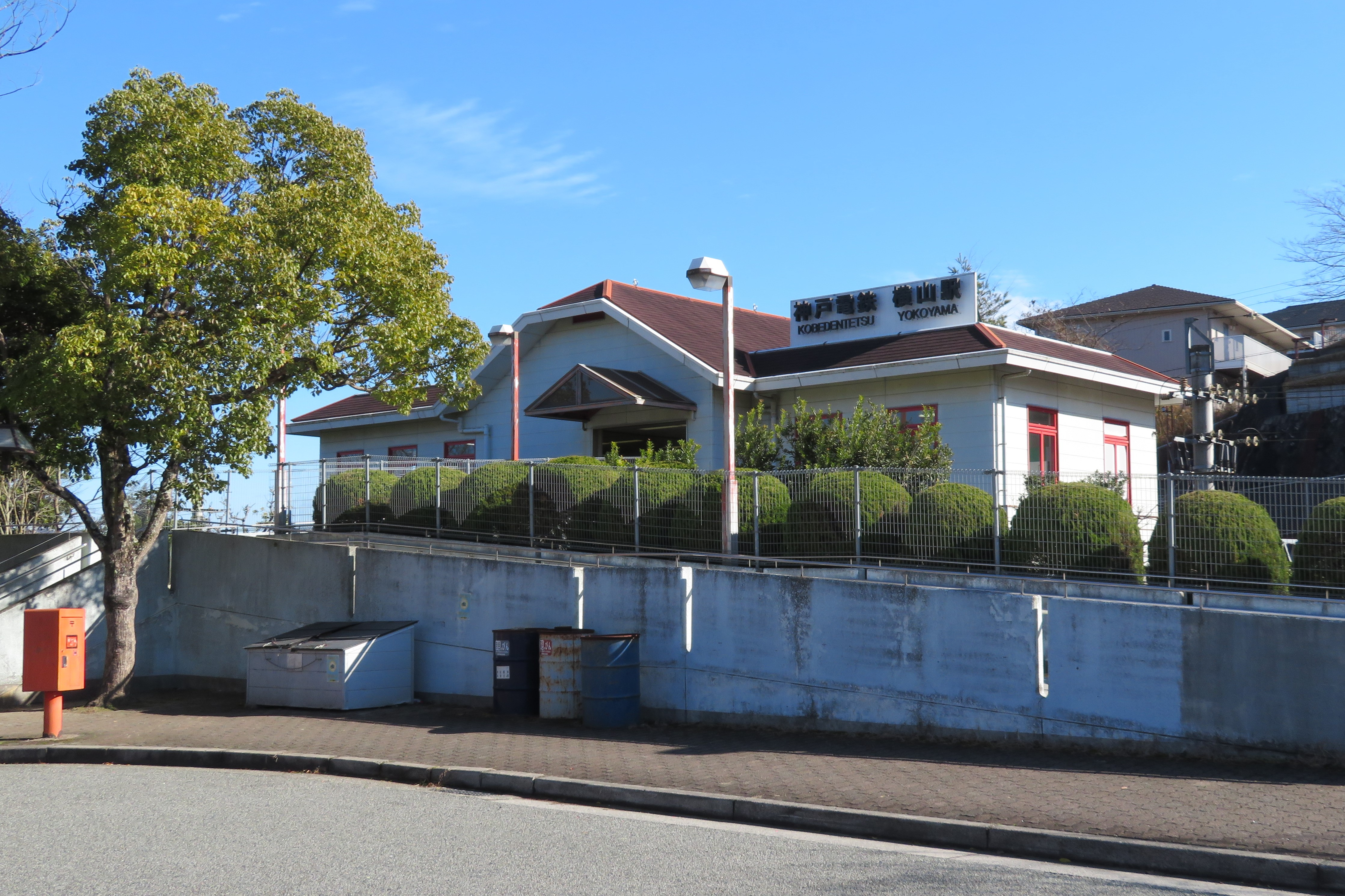 神戸電鉄横山駅